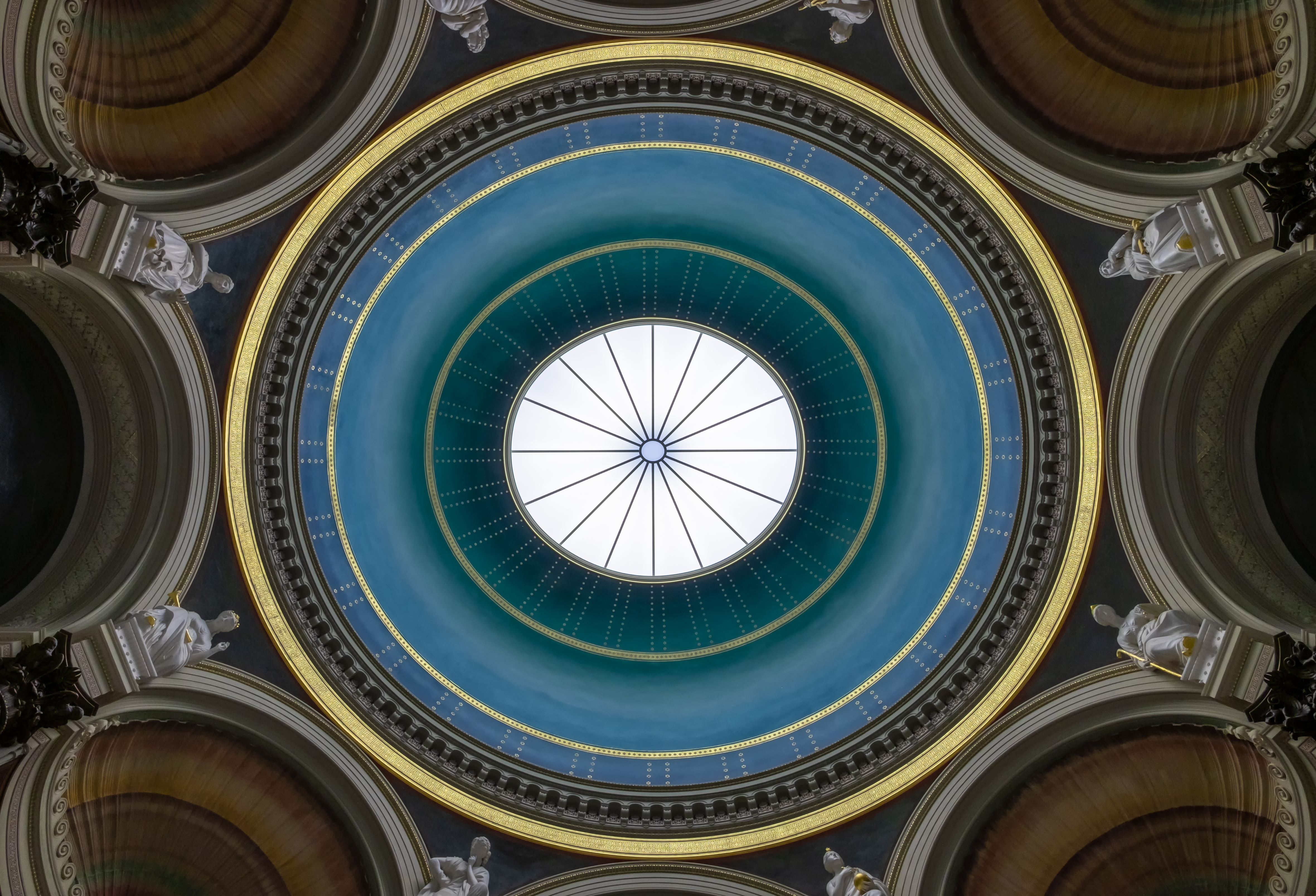 Alte Nationalgalerie Berlin, Kuppel im ersten Obergeschoß